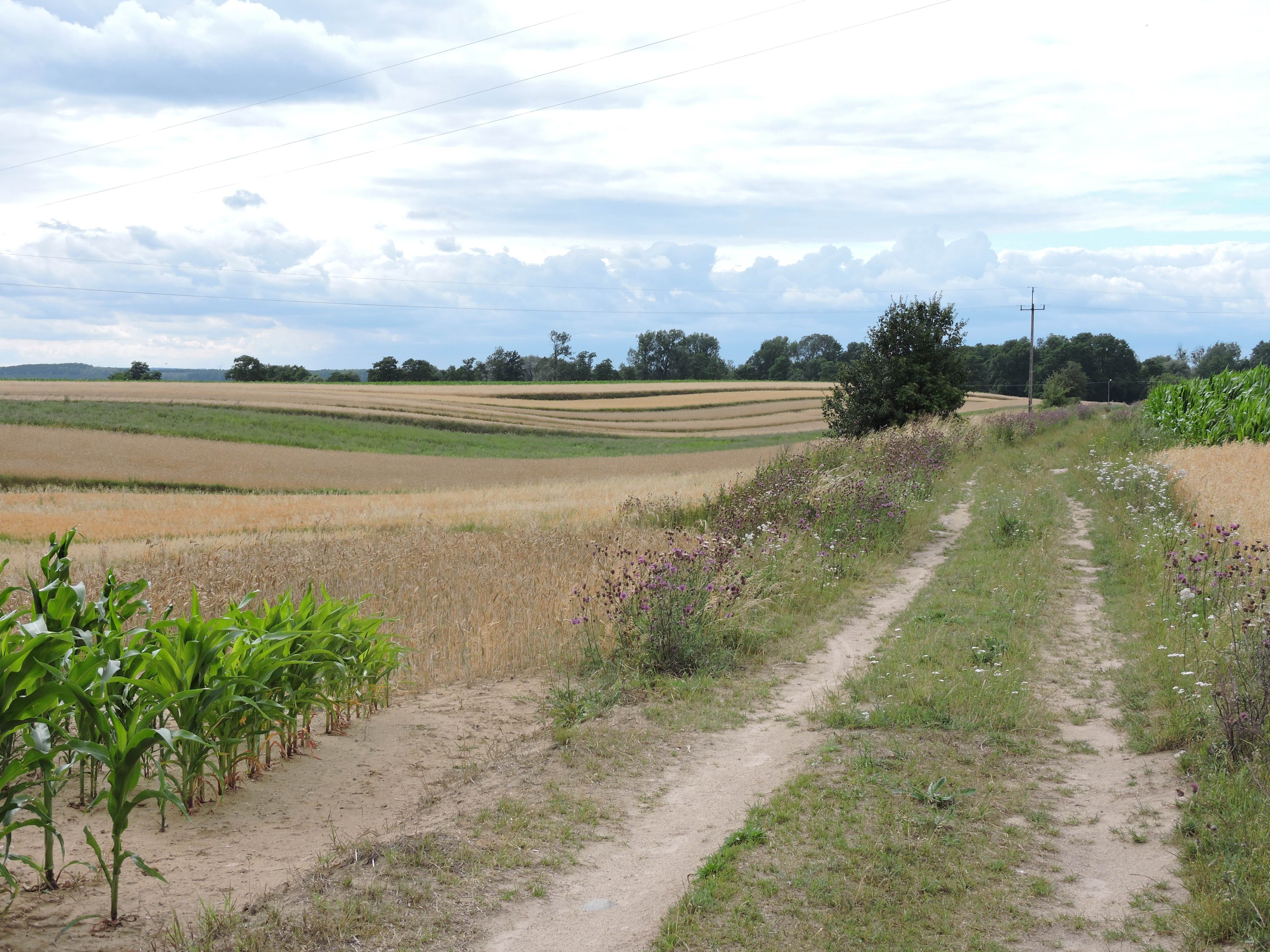 Droga powiatowa 3213P pomiędzy miejscowością Kramsk-Pole, a Kramsk-Łazy (9 lipca 2016)